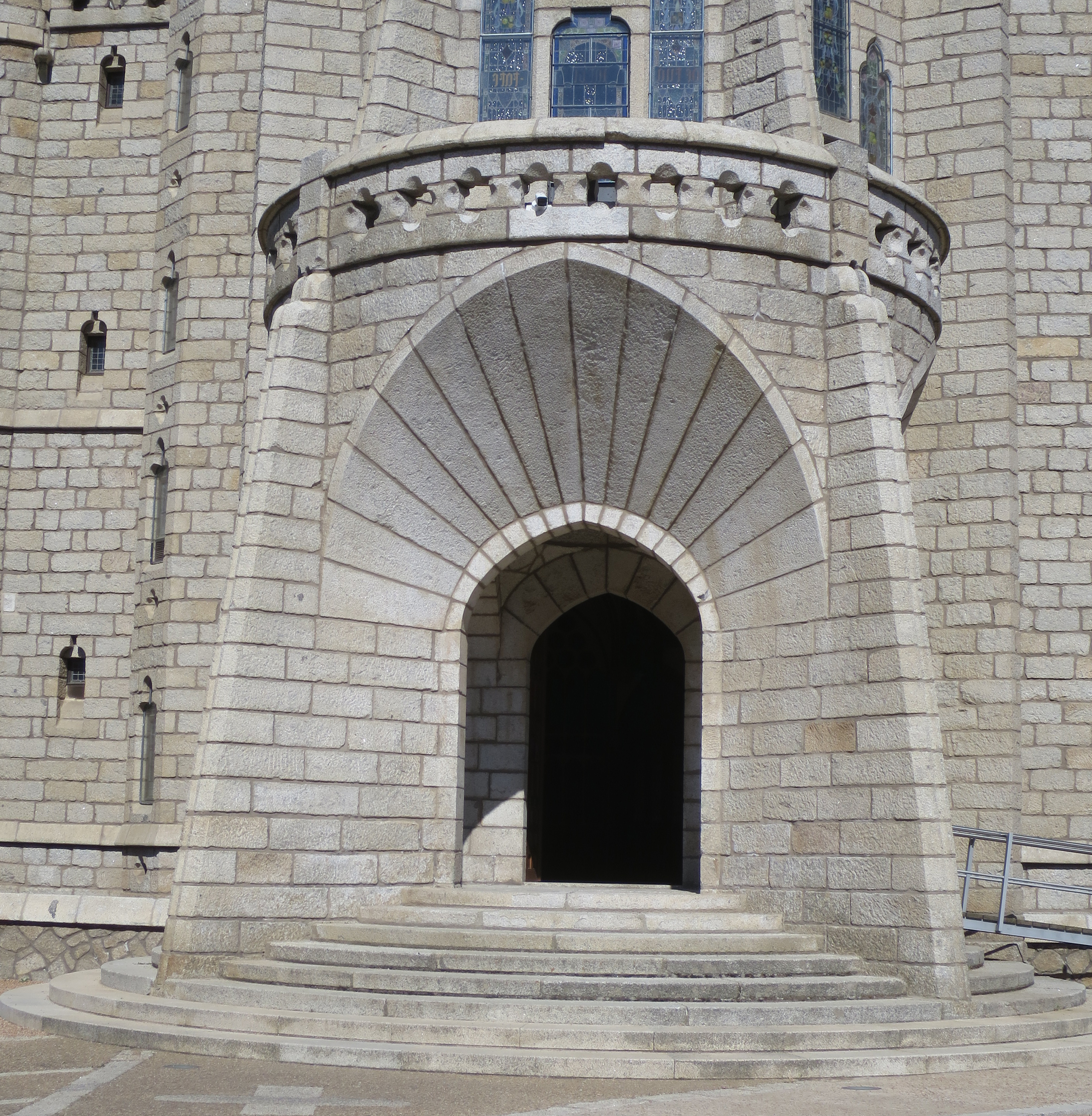 Eingang des Bischofspalastes von Astorga